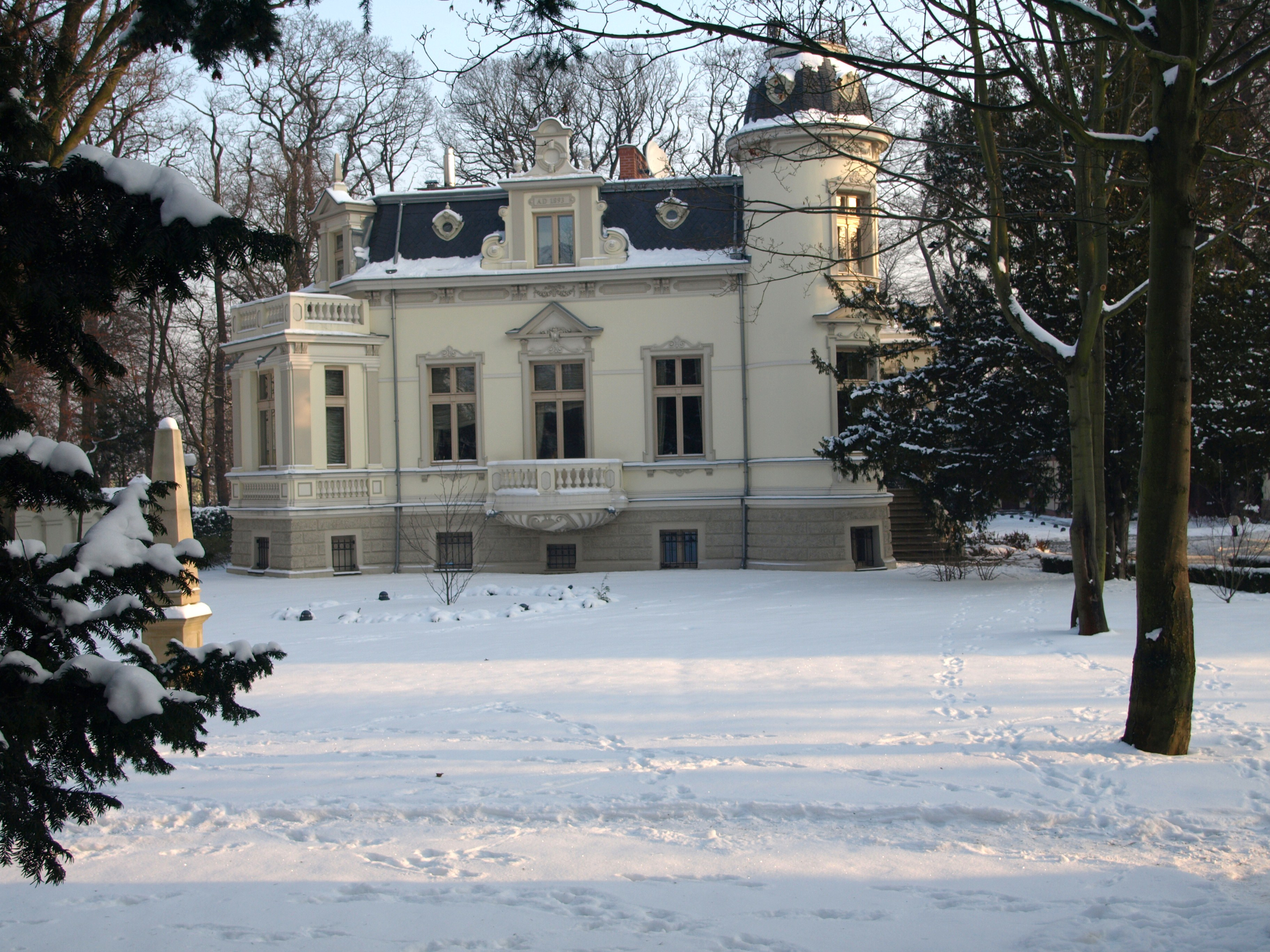 Sopot Dolny, ul. Władysława IV 3/5 - willa "Hestia", 1893 ("zagrała" dom konsula w filmie "DO WIDZENIA, DO JUTRA..." z 1960)